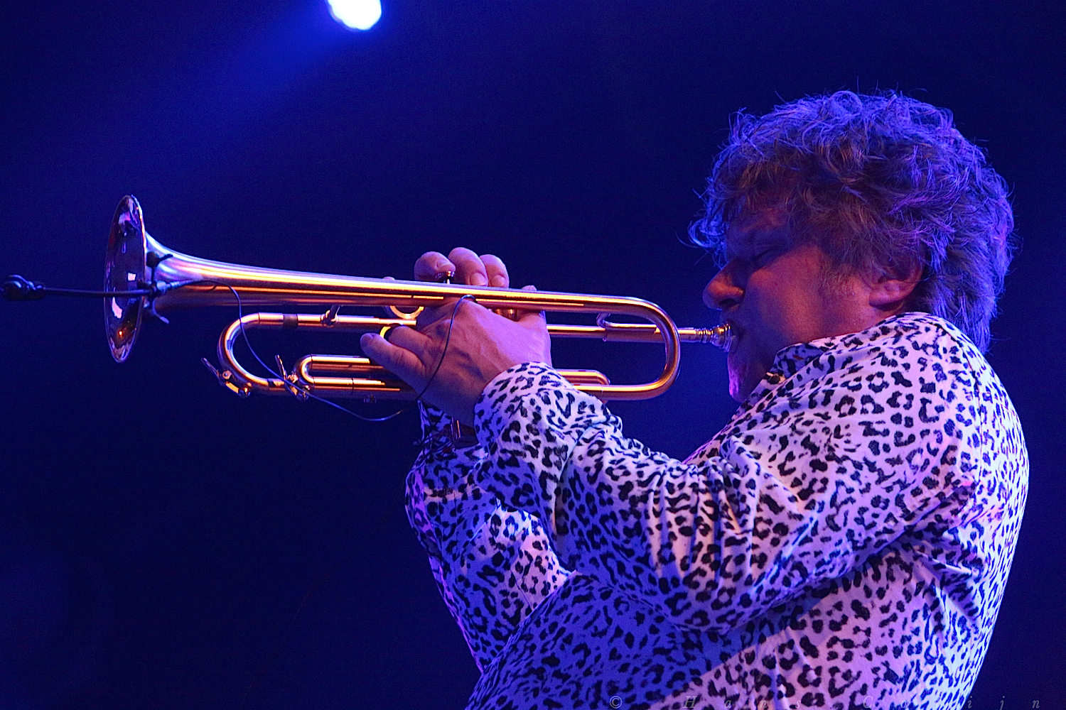 Eric Vloeimans, foto Hans Colijn